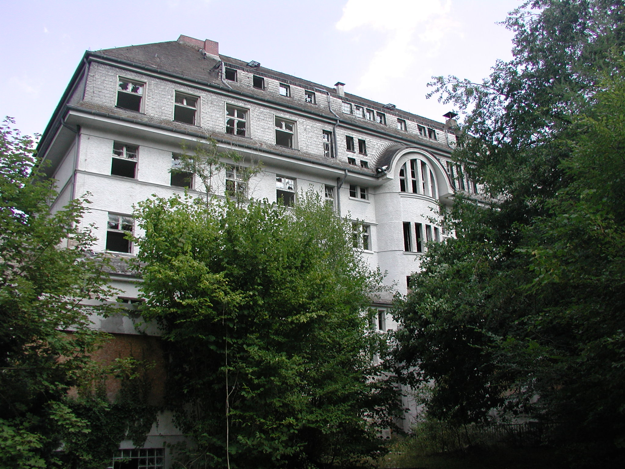 Kurhaus Stromberg 2018, Ruine, Blick auf die westliche Seite